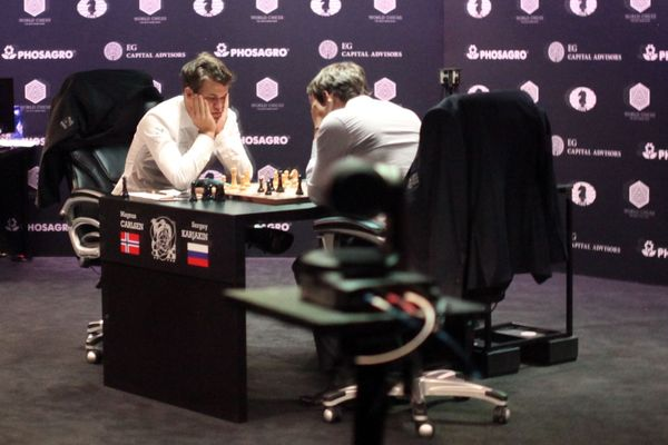 Карлсен - Карякин, 3 партия